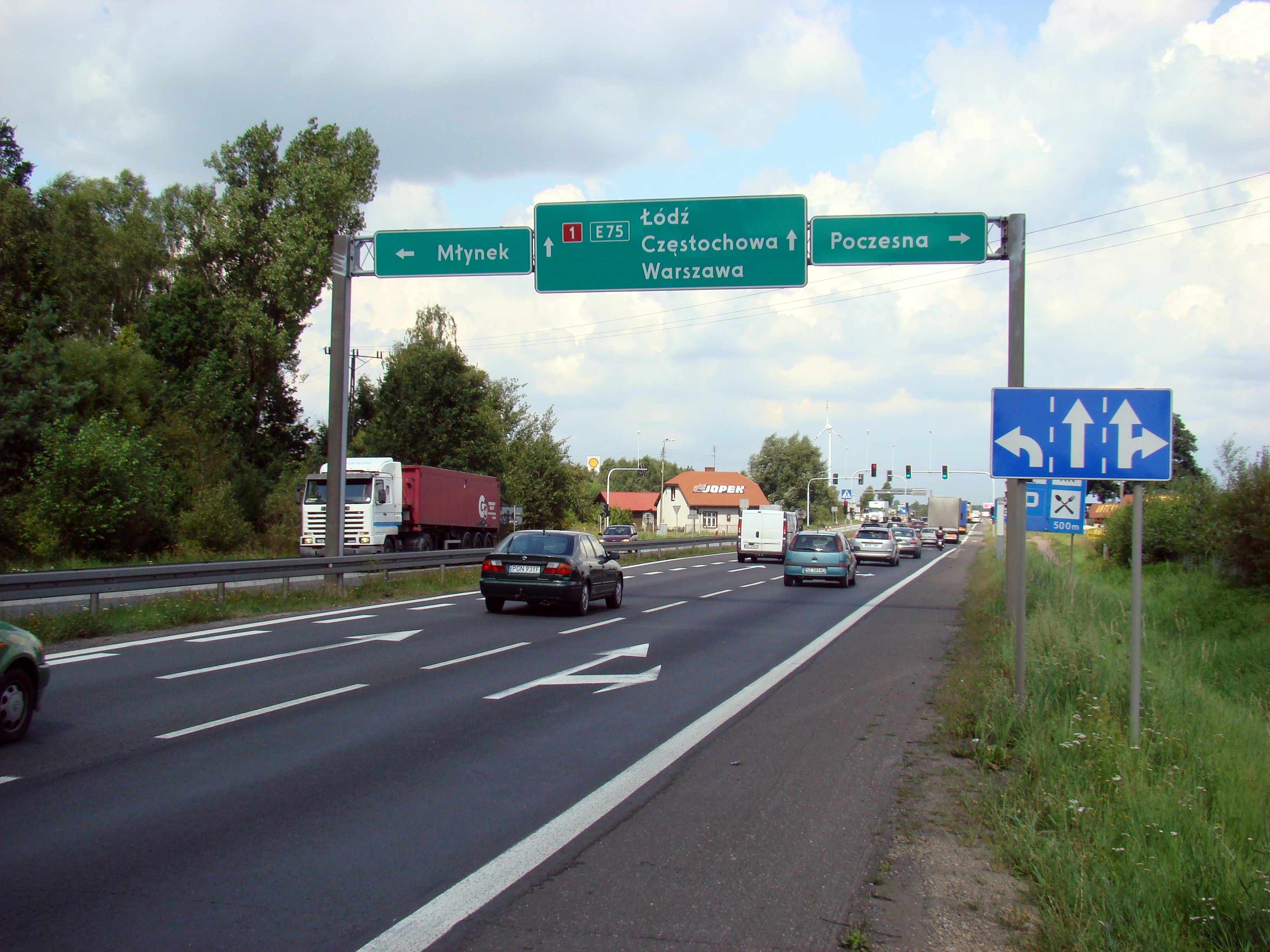 Skrzyżowanie drogi krajowej nr 1 w kierunku Częstochowy w Poczesnej. Na pierwszym planie drogowskazy tablicowe.